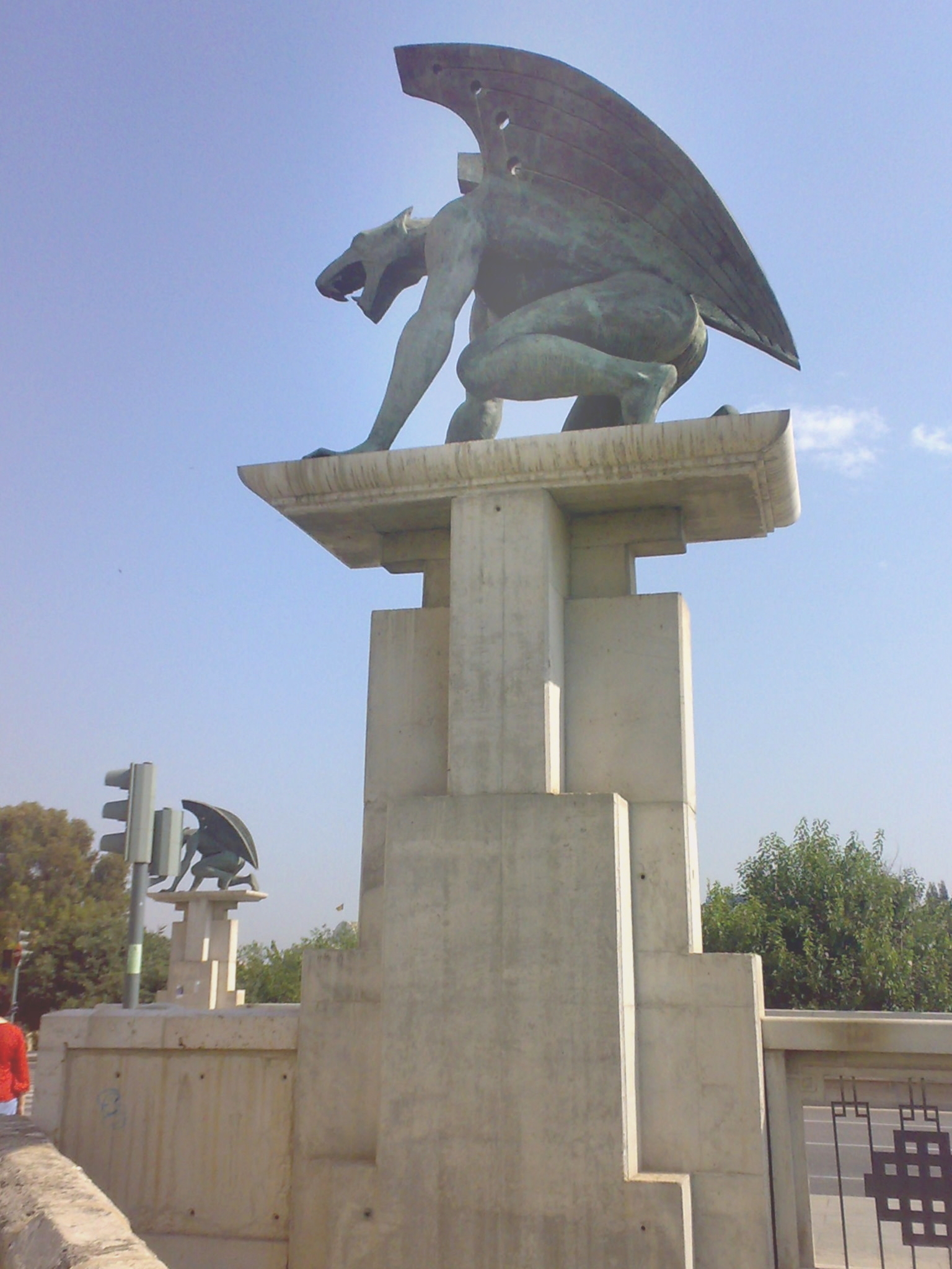 Pont del Regne de València (gàrgola en primer pla), València (Espanya).